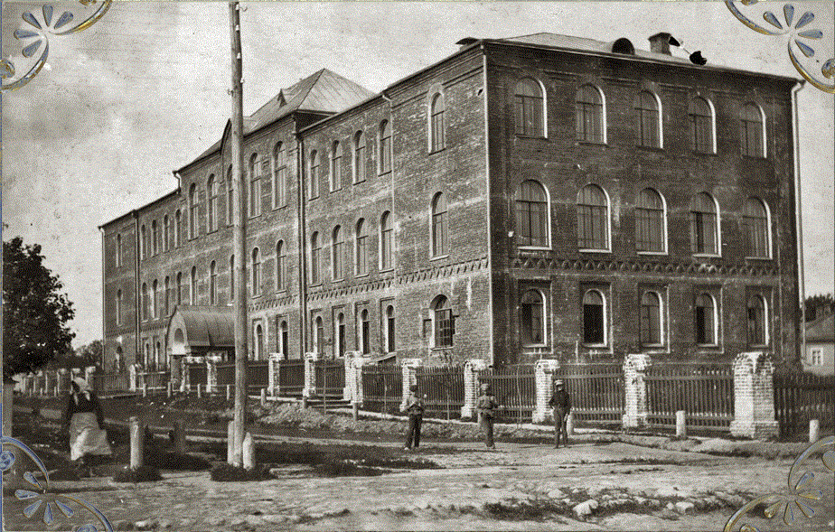 Кашинская духовная семинария